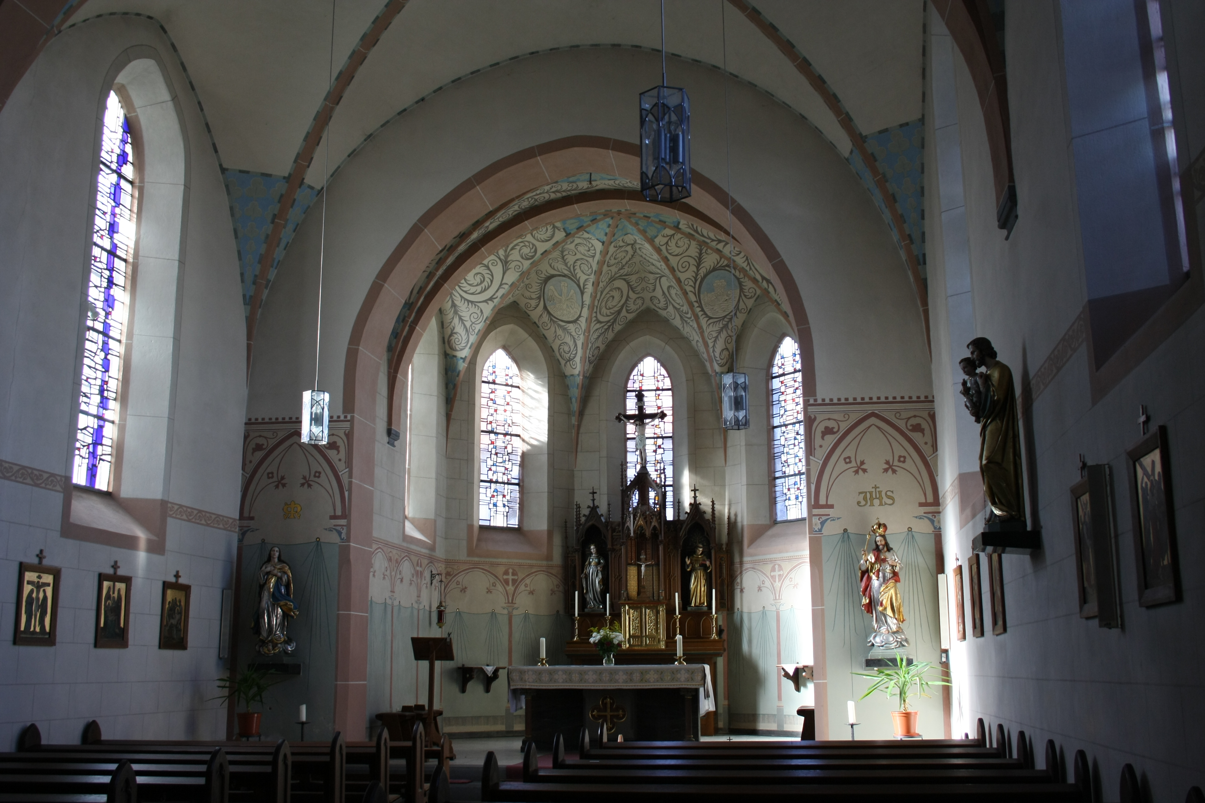 katholische Pfarrkirche St. Notburgis in Lind (bei Altenahr), Innenraum